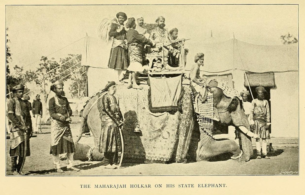 Maharaja of Holkar on his state elephant